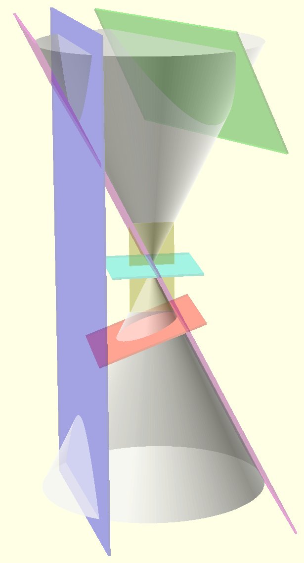 החרוט יחד עם 6 מישורים שחותחים אותו, ויוצרים יחד את כל חתחי החרוט.